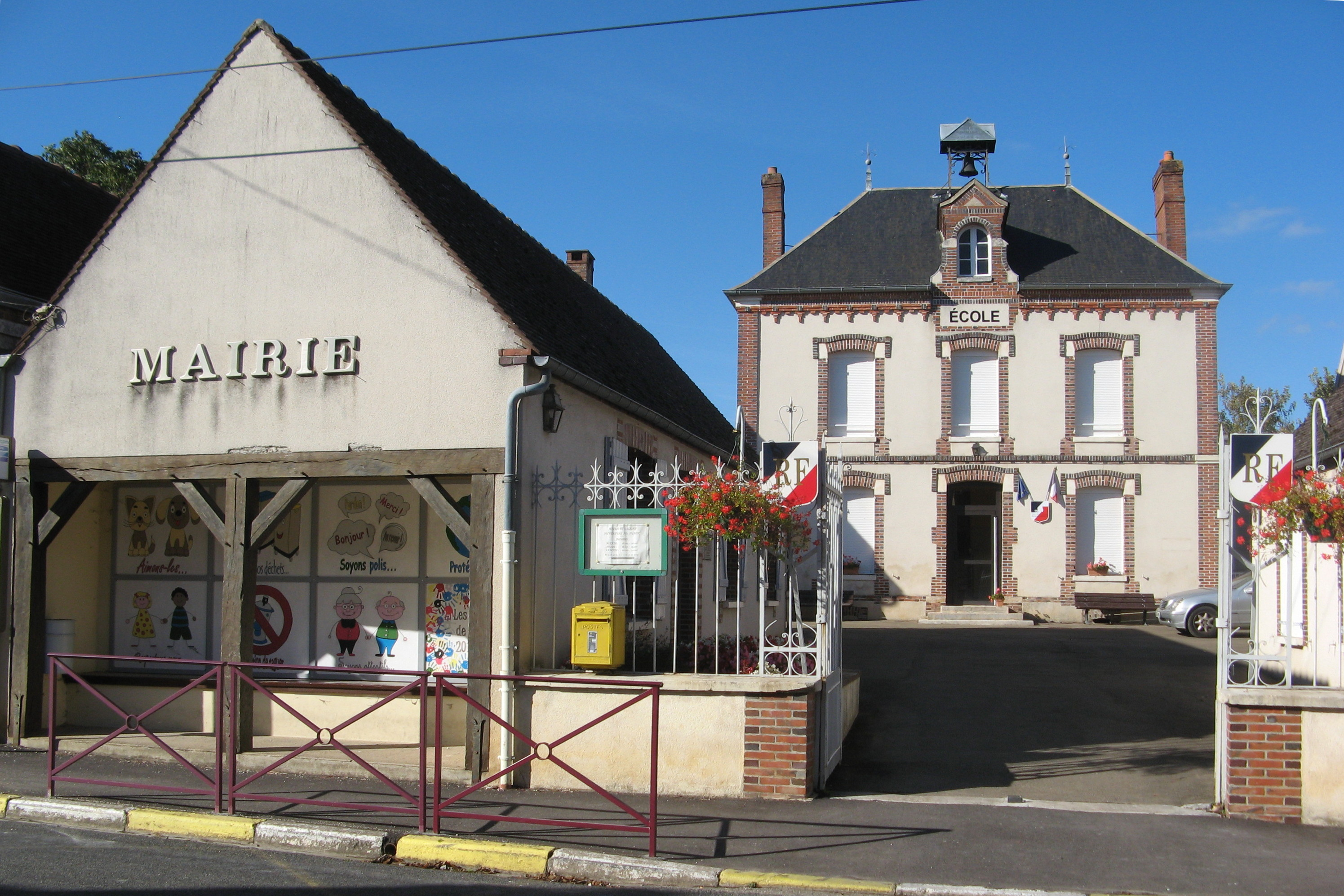 Saligny (Yonne) : mairie et école